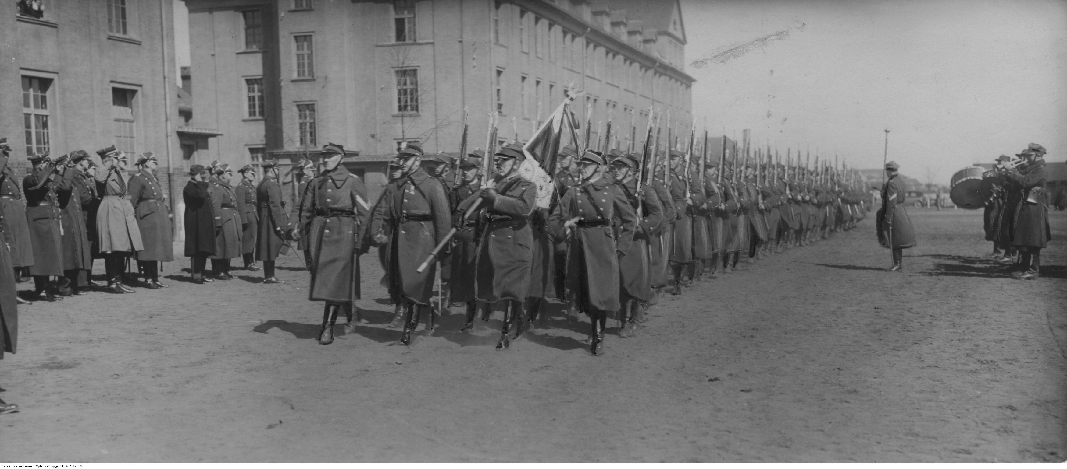 Jubileusz dziesięciolecia 7 Batalionu Saperów w Poznaniu - defilada; kwiecień 1929. Koncern Ilustrowany Kurier Codzienny - Archiwum Ilustracji. Sygnatura: 1-W-1720-3